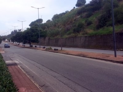 Salita